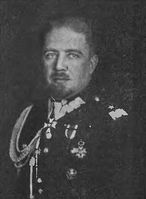 Jakub Krzemieński